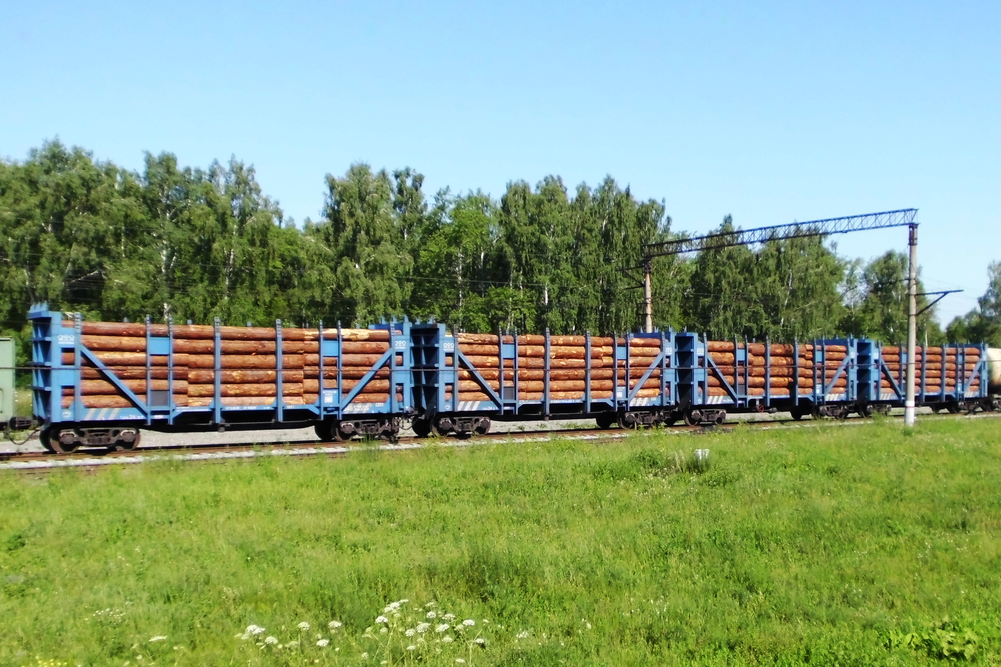 Специализированные железнодорожные платформы для перевозки круглых лесоматериалов в составе грузового поезда.